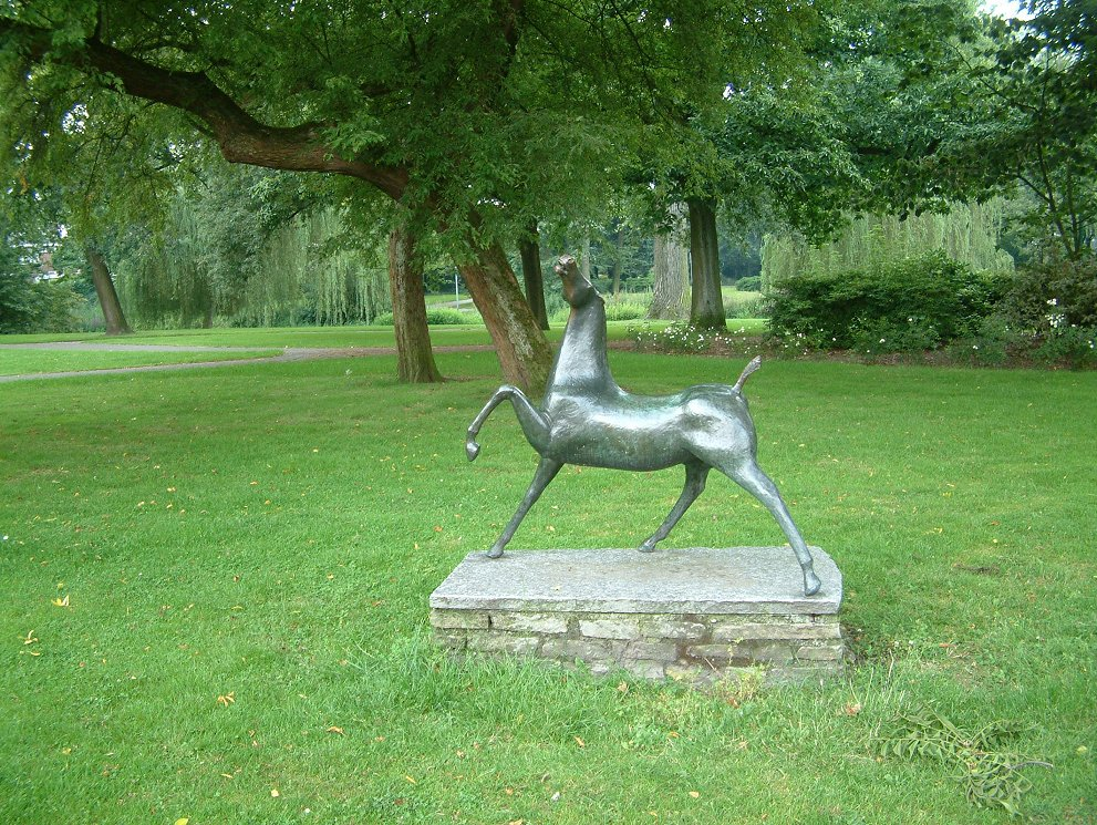 Anne Frankplantsoen in Eindhoven; Kunstwerk "Paard" van Otto Bänninger uit 1954. Gestolen in 2010.